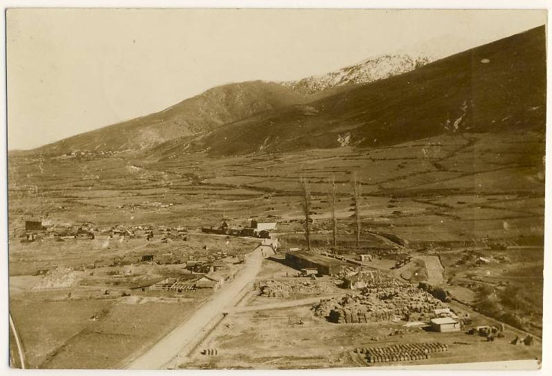 Кажани и Цапари през Първата световна война